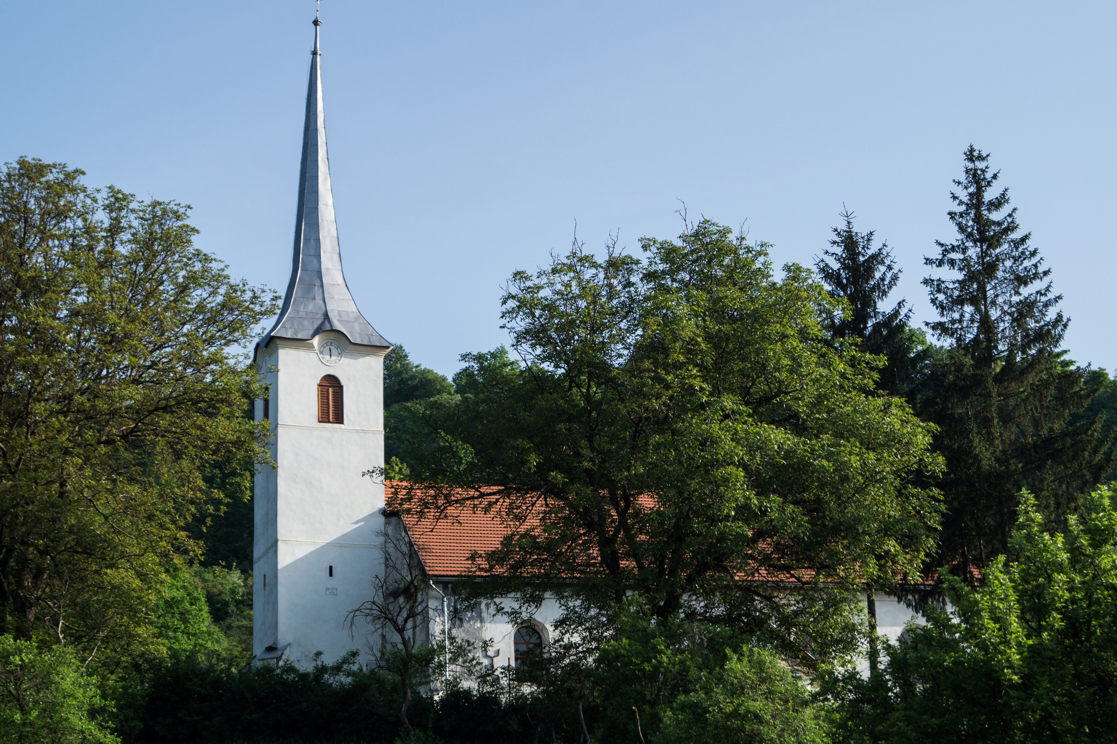 Kőrispatak, reformatus templom